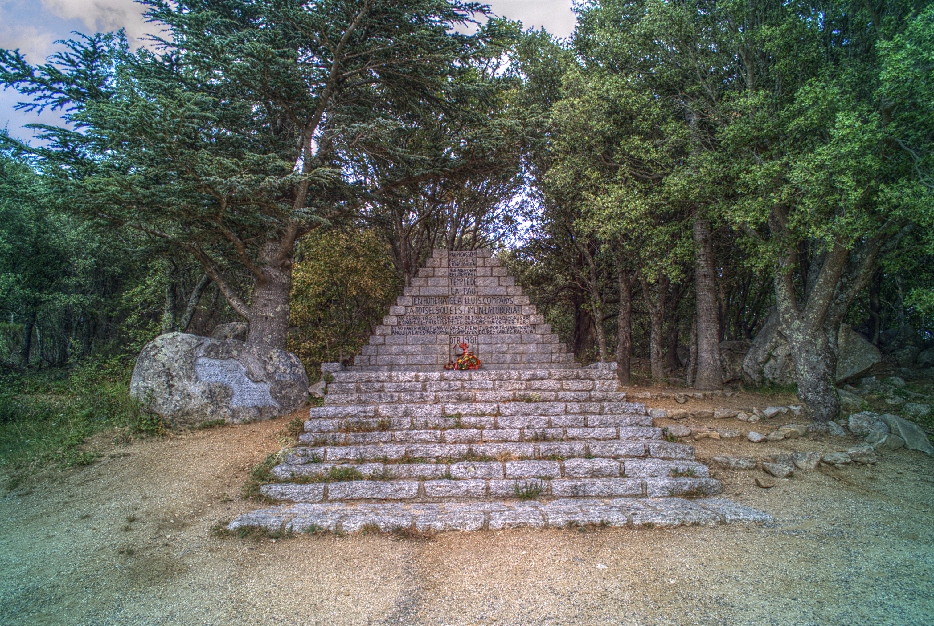 Monument à Lluís Companys, Col de Manrella, Maureillas-La-Illas (Pyrénées-Orientales, Languedoc-Roussillon, France), Agullana (Haut-Ampurdan, Gérone, Catalogne, Espagne)